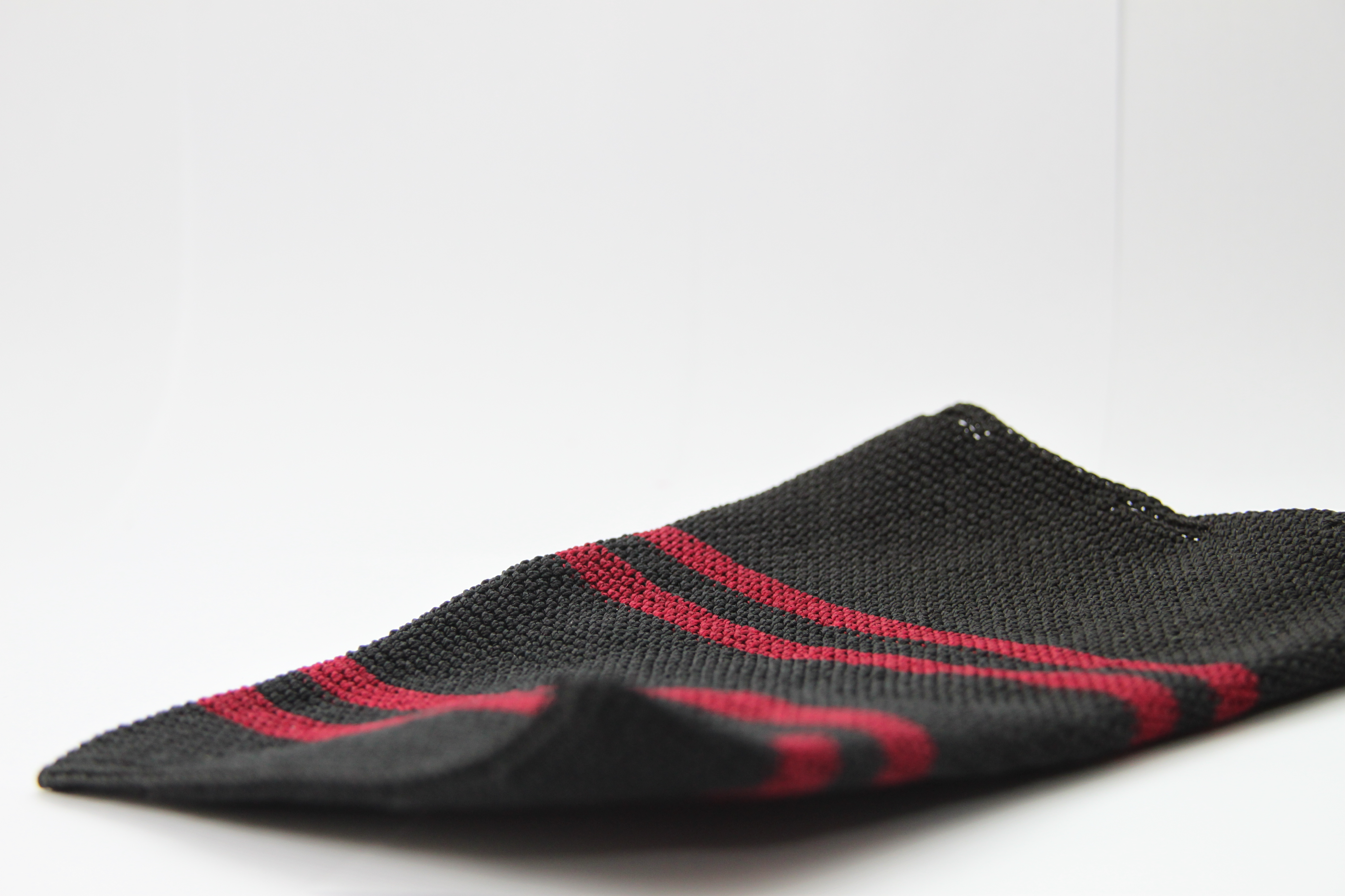 Gant de toilette Kiss utilisé la plupart du temps au hammam.